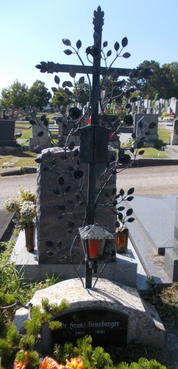 Franz Grasberger-Baumgartner Friedhof (T-1946)